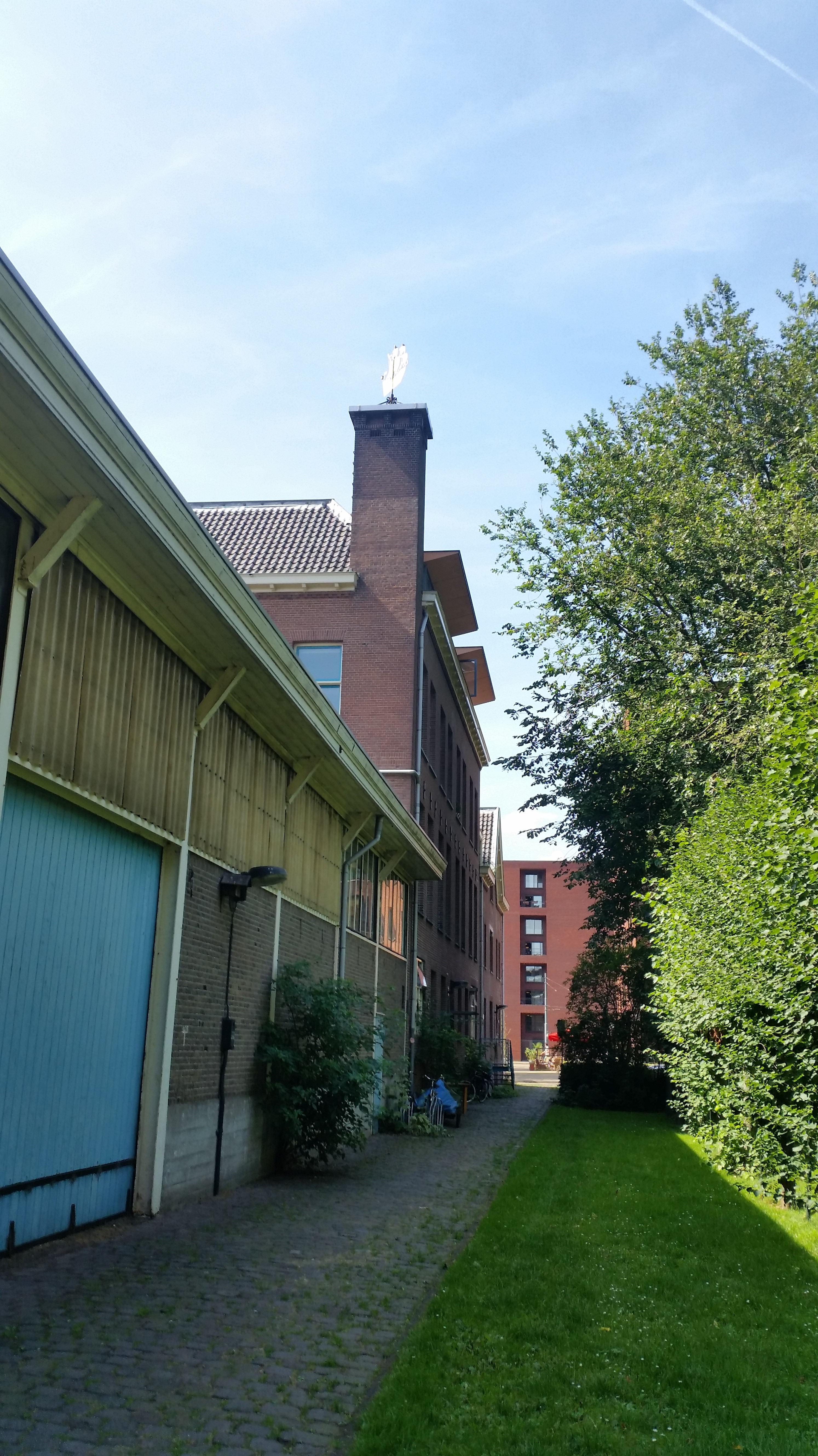 Windwijzer op gebouw aan de Levantkade aan de kant van het Mien Ruysplantsoen, Amsterdam (op schoorsteen)